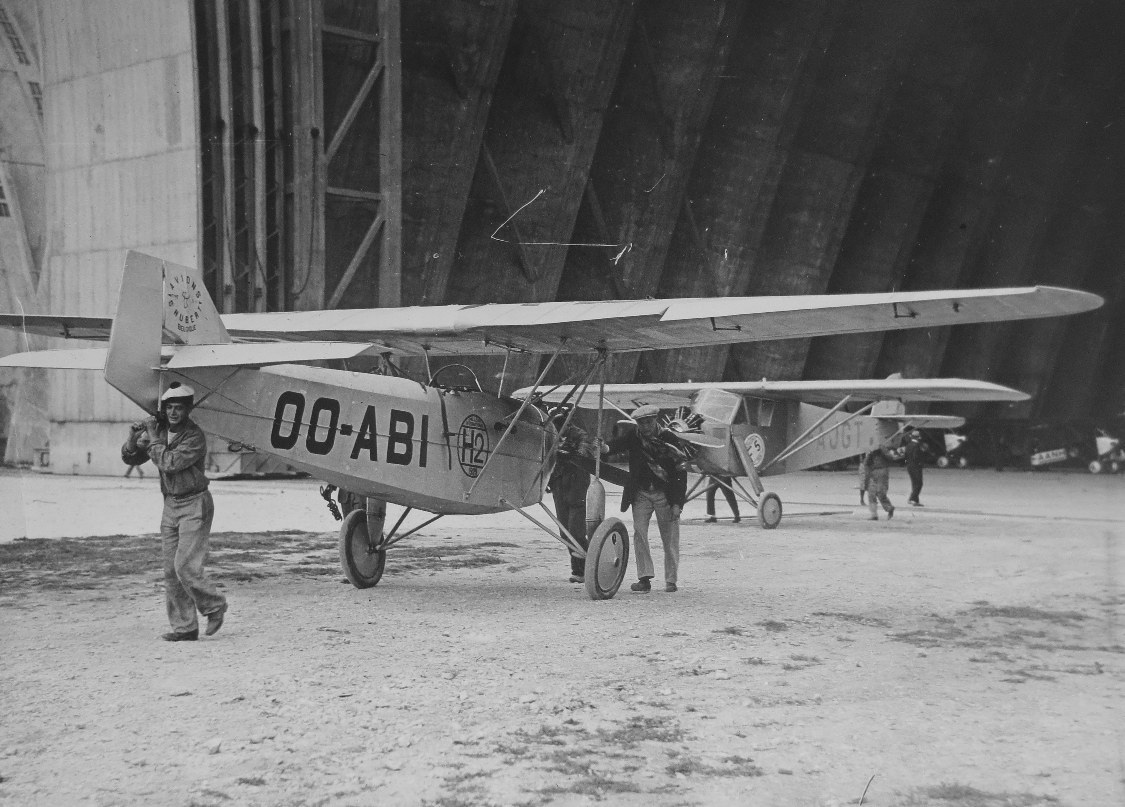 Walter NZ-85 a ORTA St. Humbert (Challenge 1929)